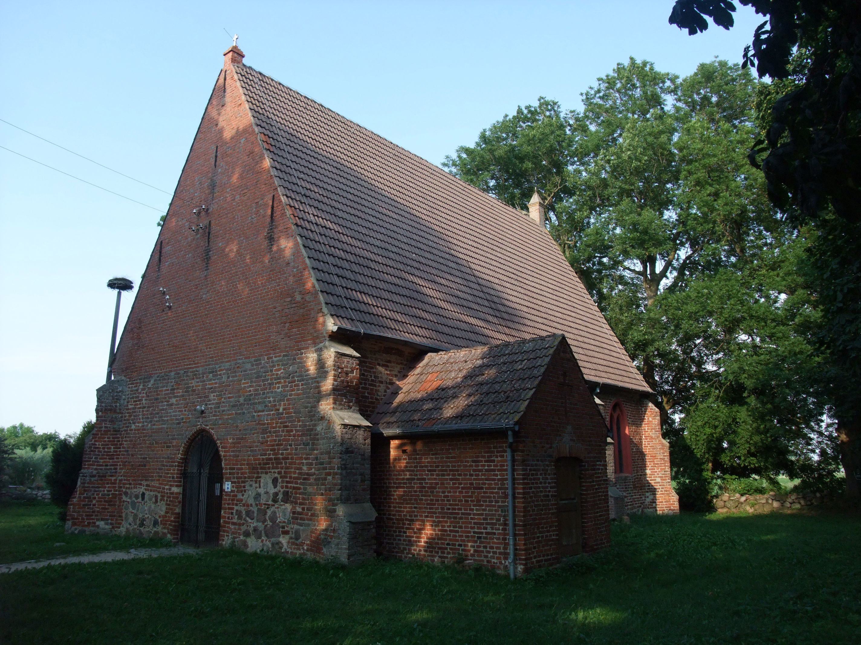 Marienkirche Netzelkow, Lütow, Deutschland